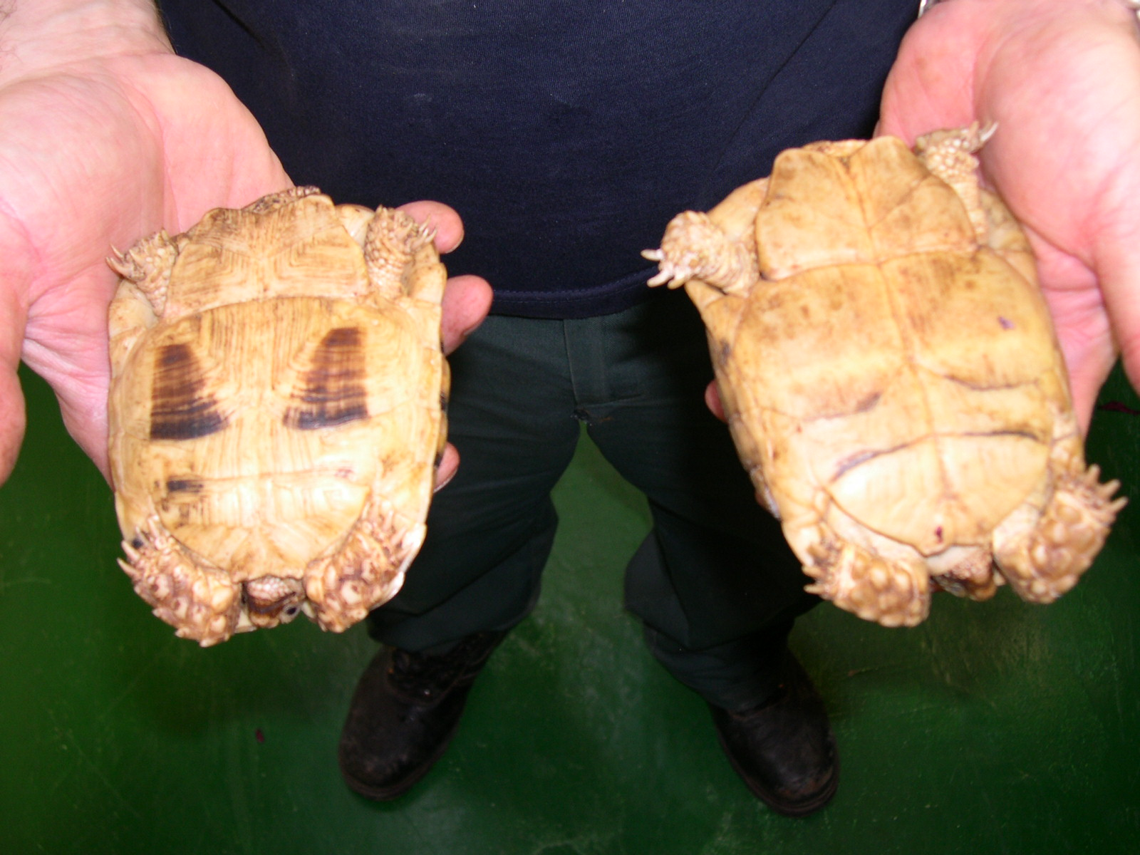 Piastrone T.werneri right- T.kleinmanni left